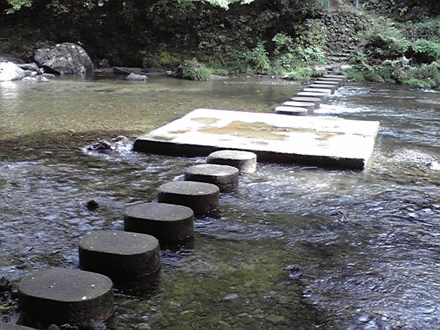 吾妻峡のドレミファ橋